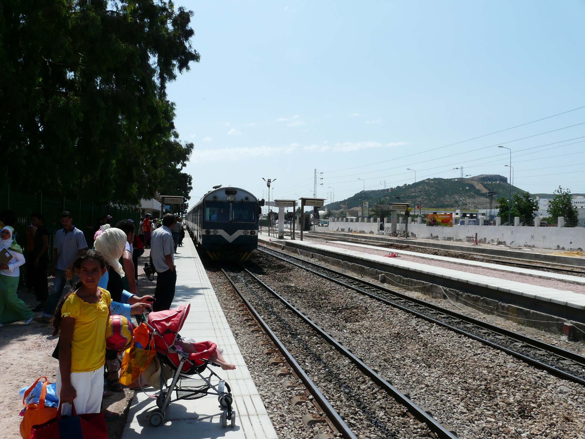 Bordj Cedria